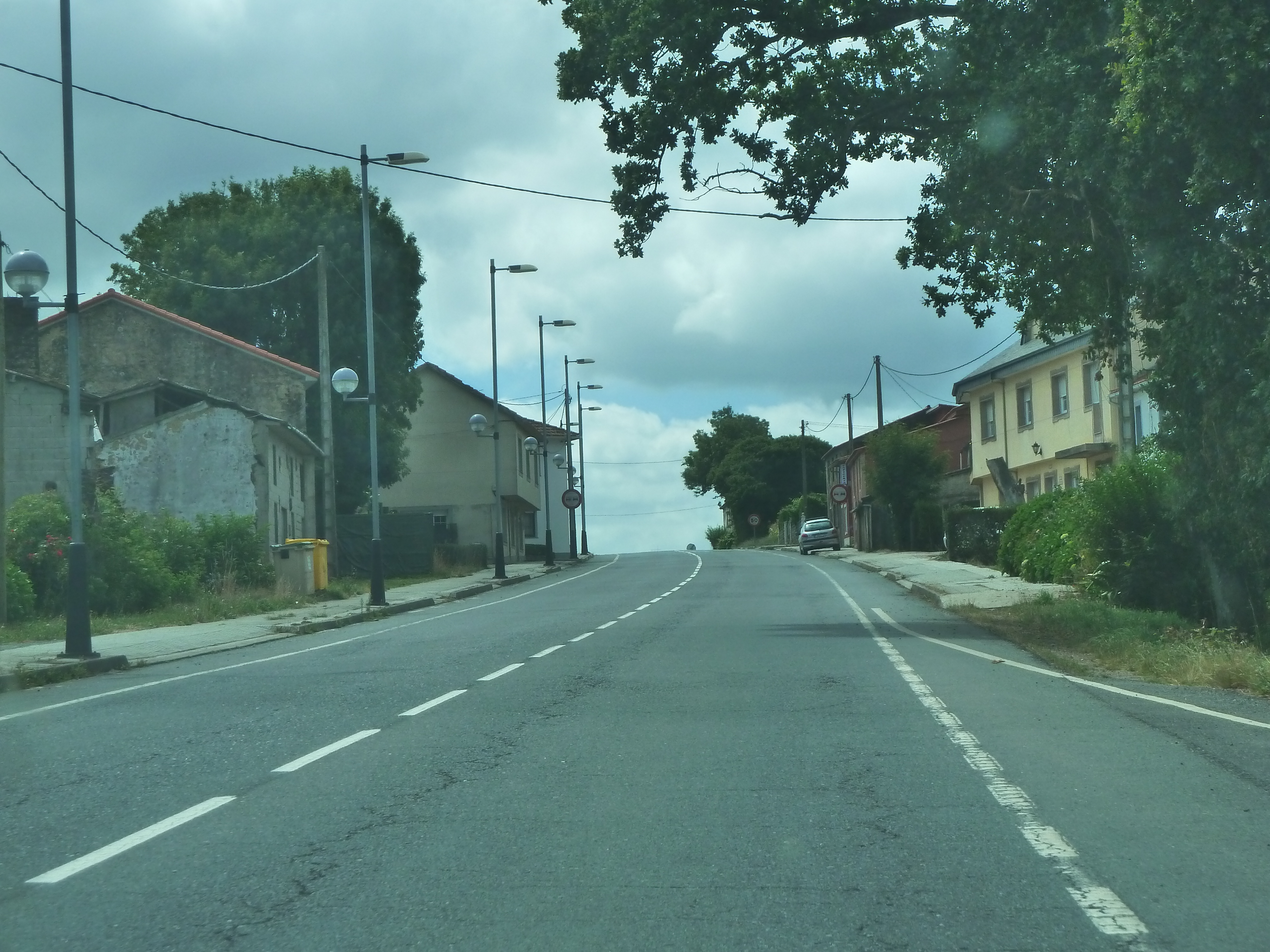 Ver título.